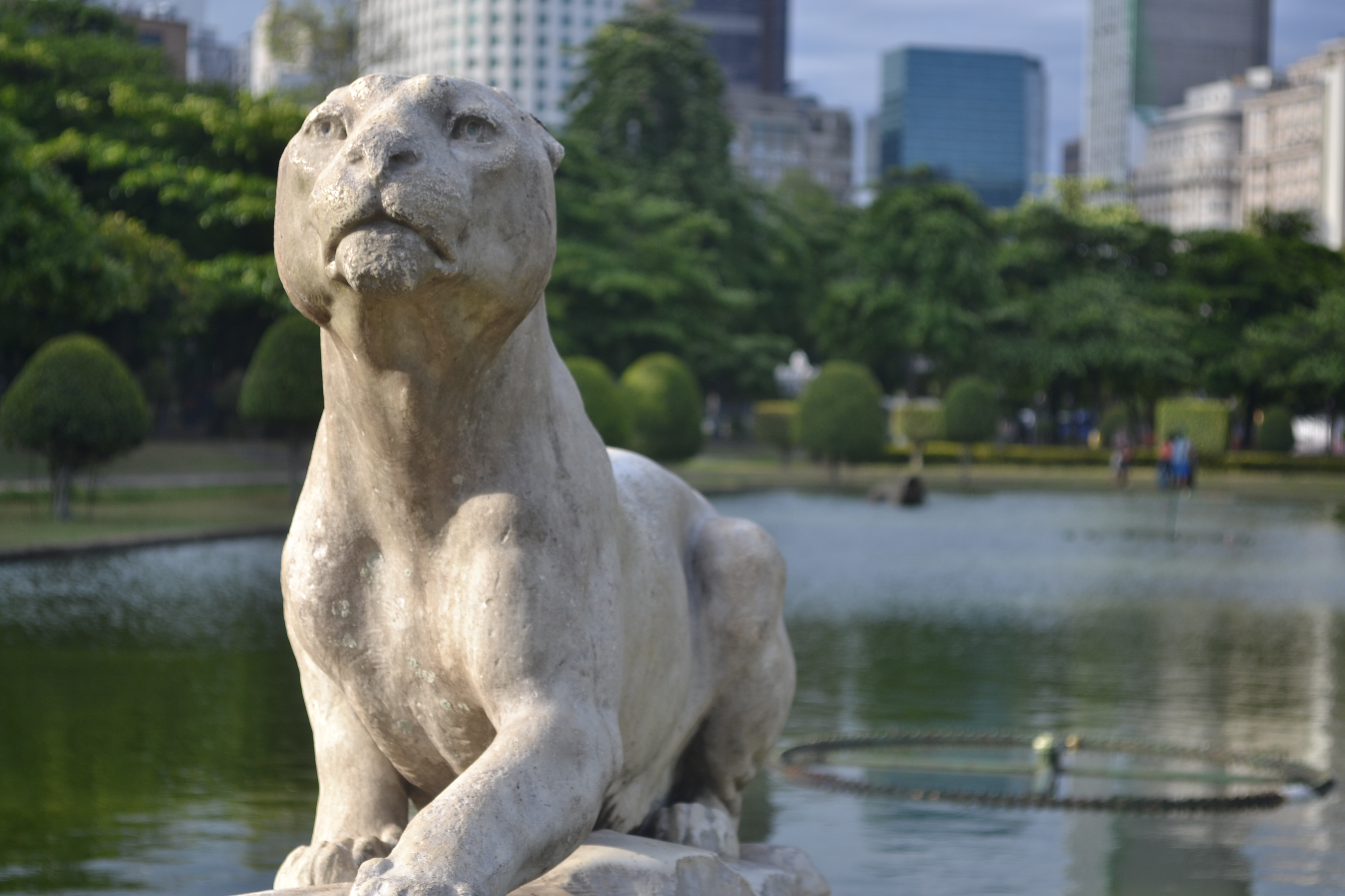 Escultura do felino à espreita em pé